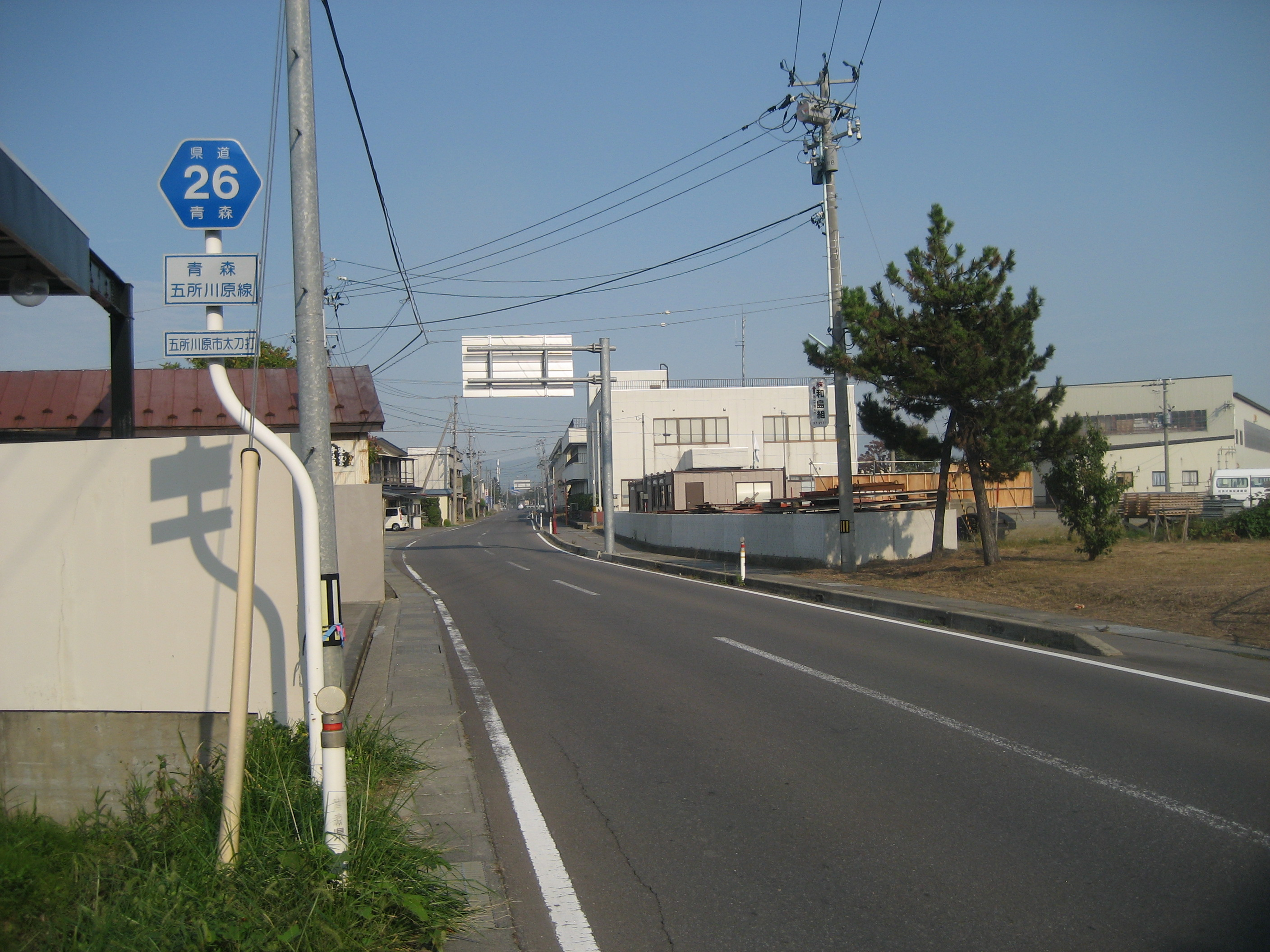 青森県道26号線五所川原市太刀打付近